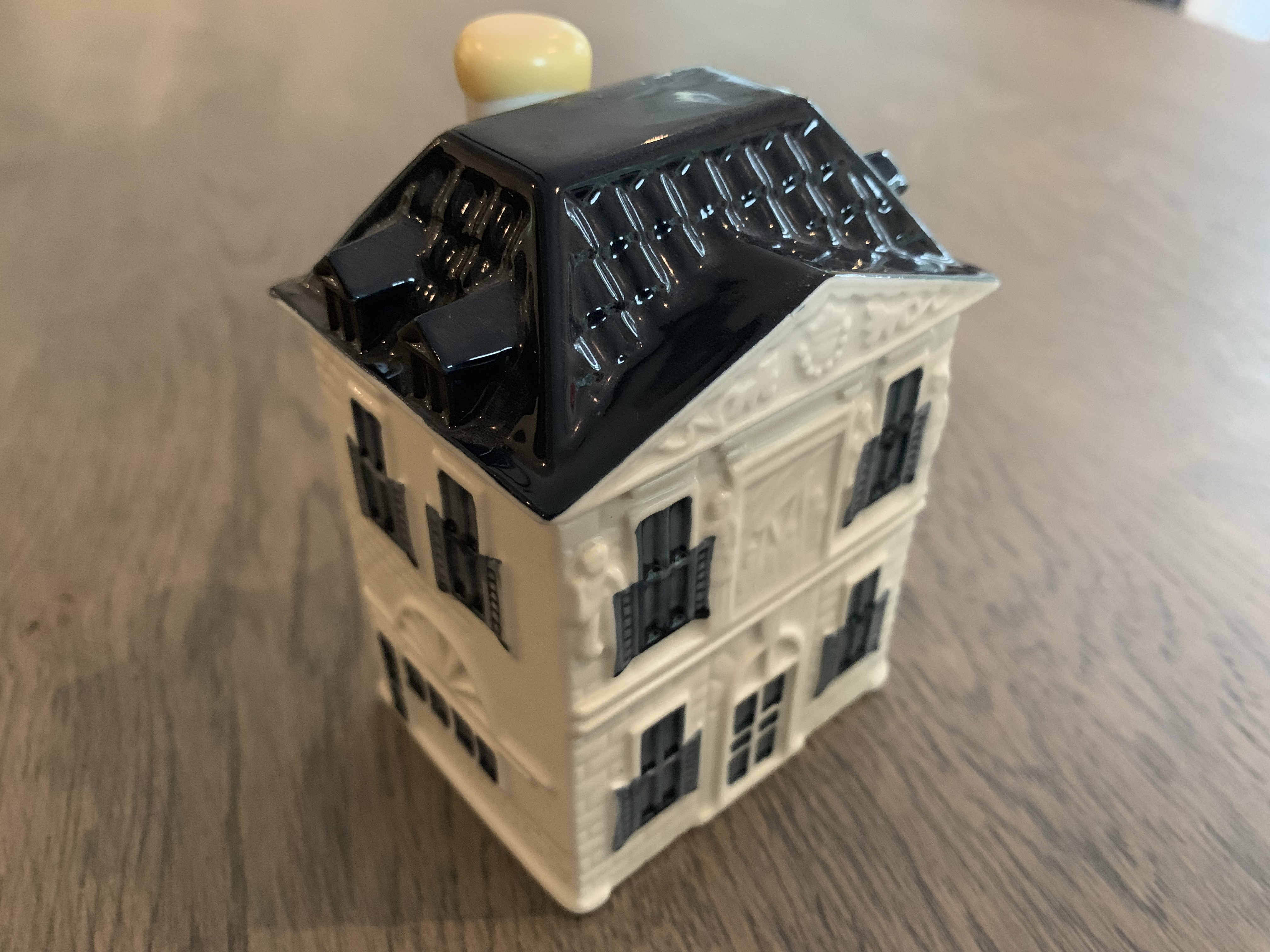 Klm huisje de waag